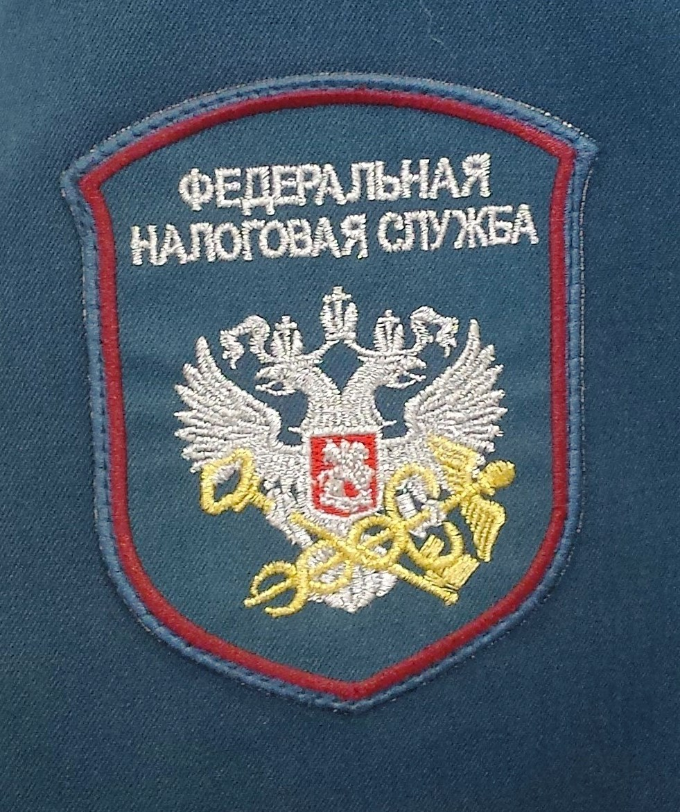 Шеврон ФНС на левом рукаве пиджака